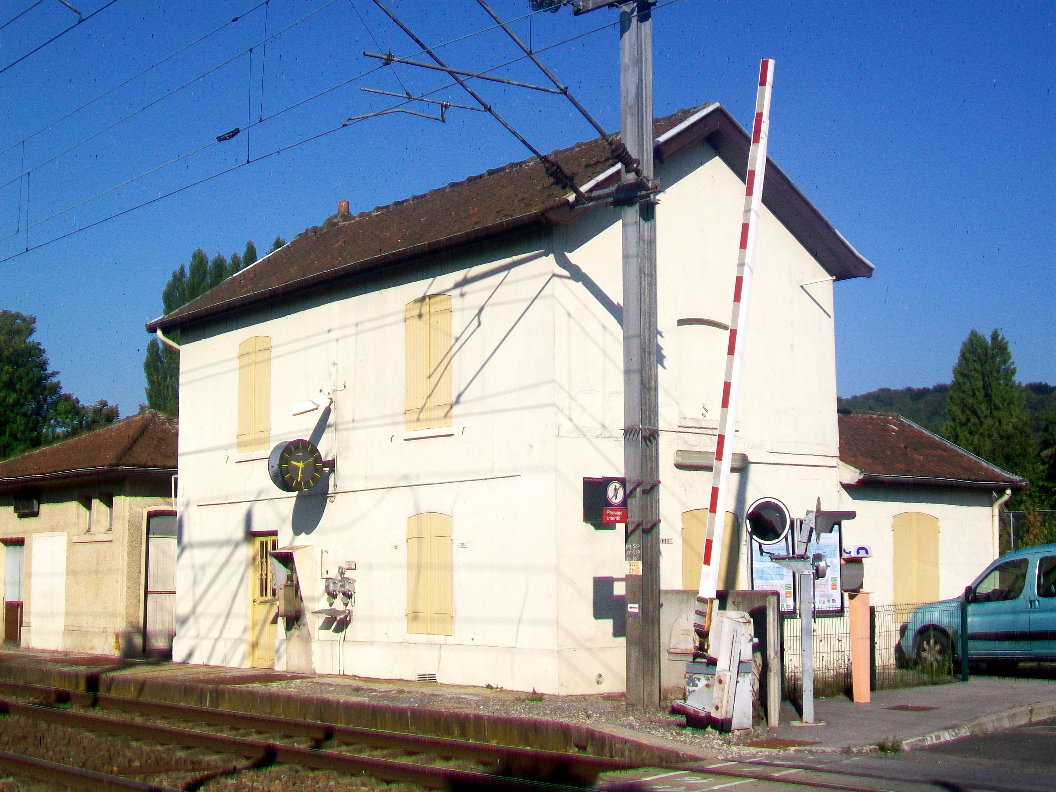 Bâtiment-voyageurs de la gare SNCF de Rieux - Angicourt (le quai visible sur la photo est l'ancien quai, le quai actuel se trouvant de l'autre côté du passage à niveau).